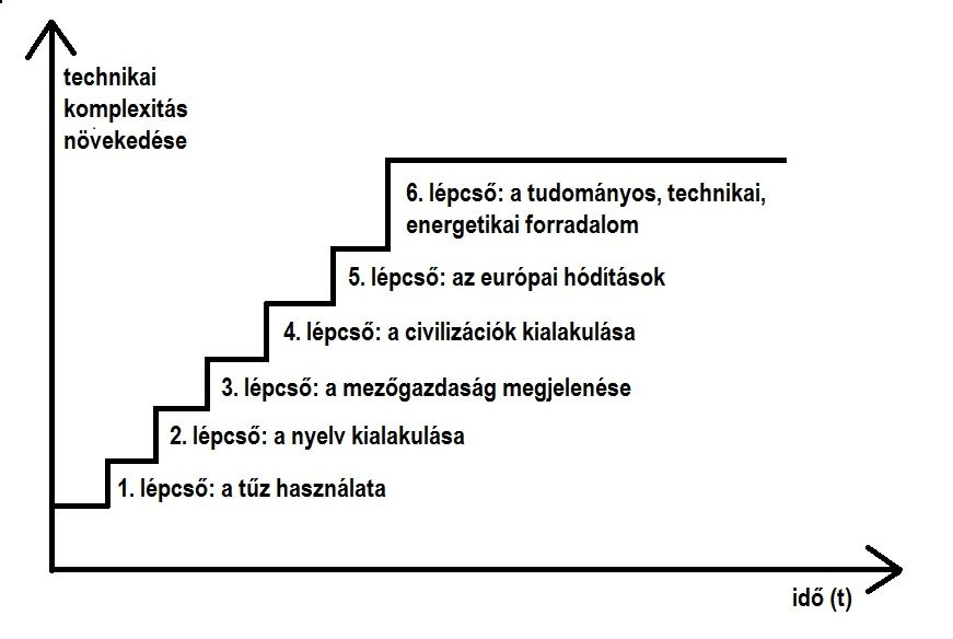 Az emberi bioszféra-átalakítás 6 lépcsője